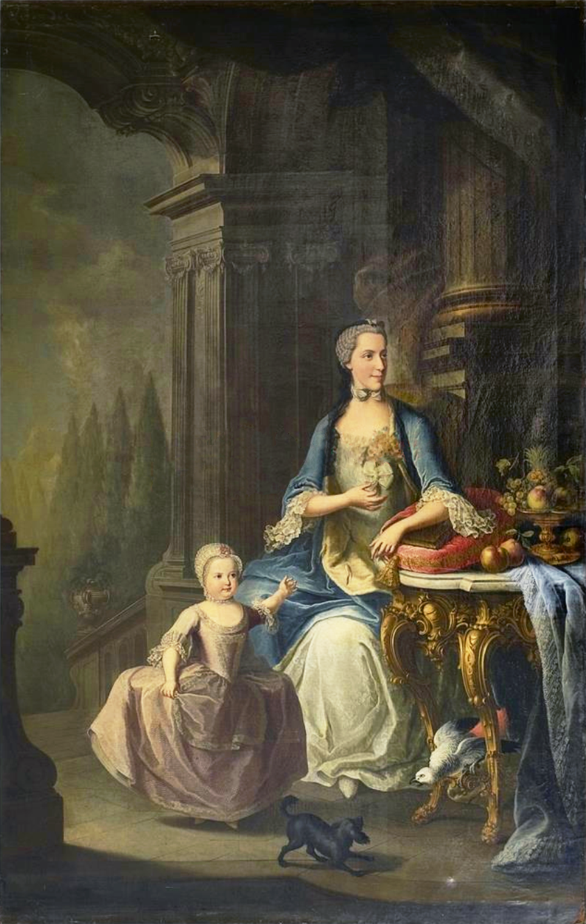 Portrait of Isabella of Parma and her daughter Archduchess Maria Theresa of Austria (1762–1770)